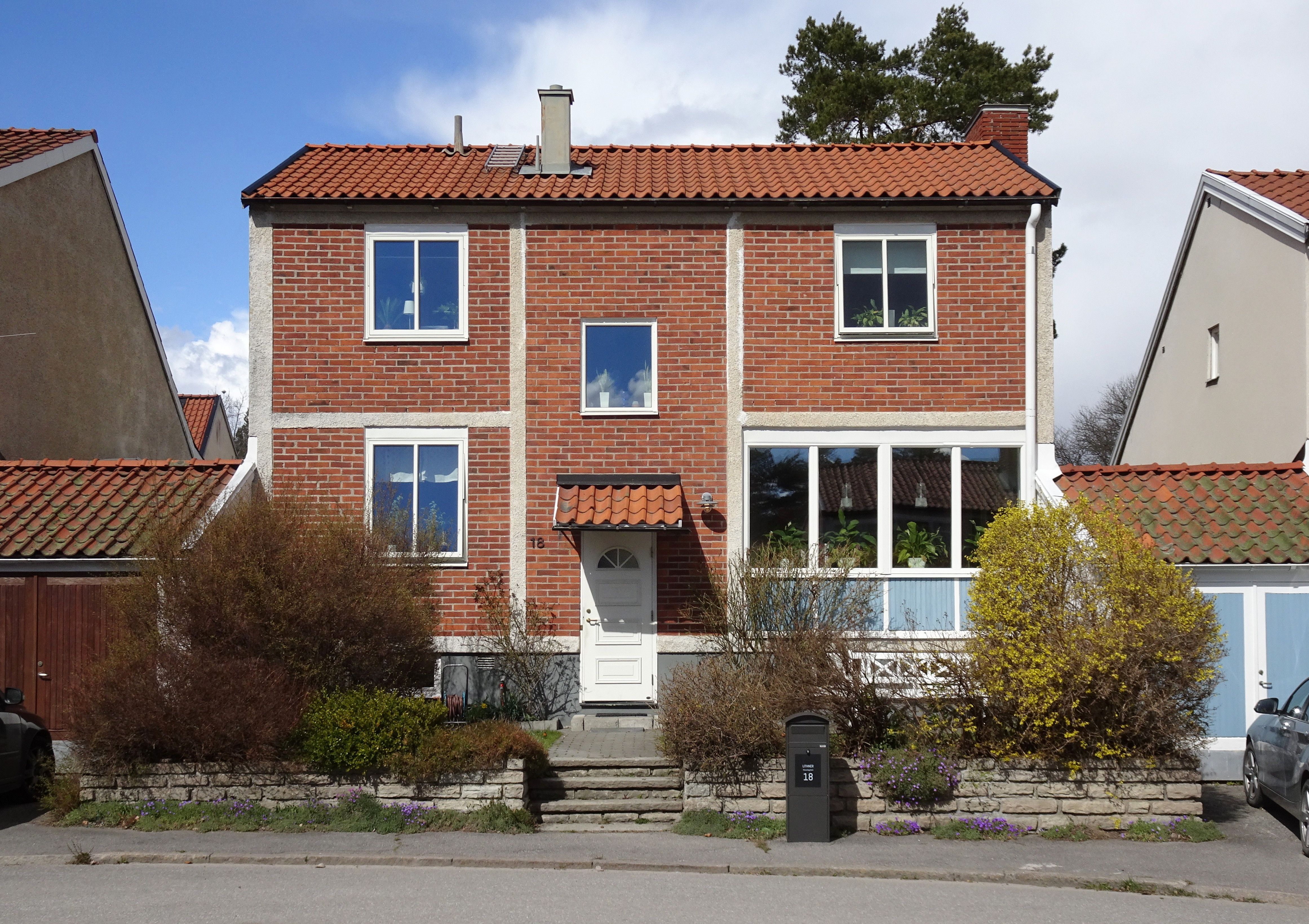 Kedjehus vid Hasselgränd, Vällingby, arkitekt Backström & Reinius, Nybyggnadsår 1958 - 1966